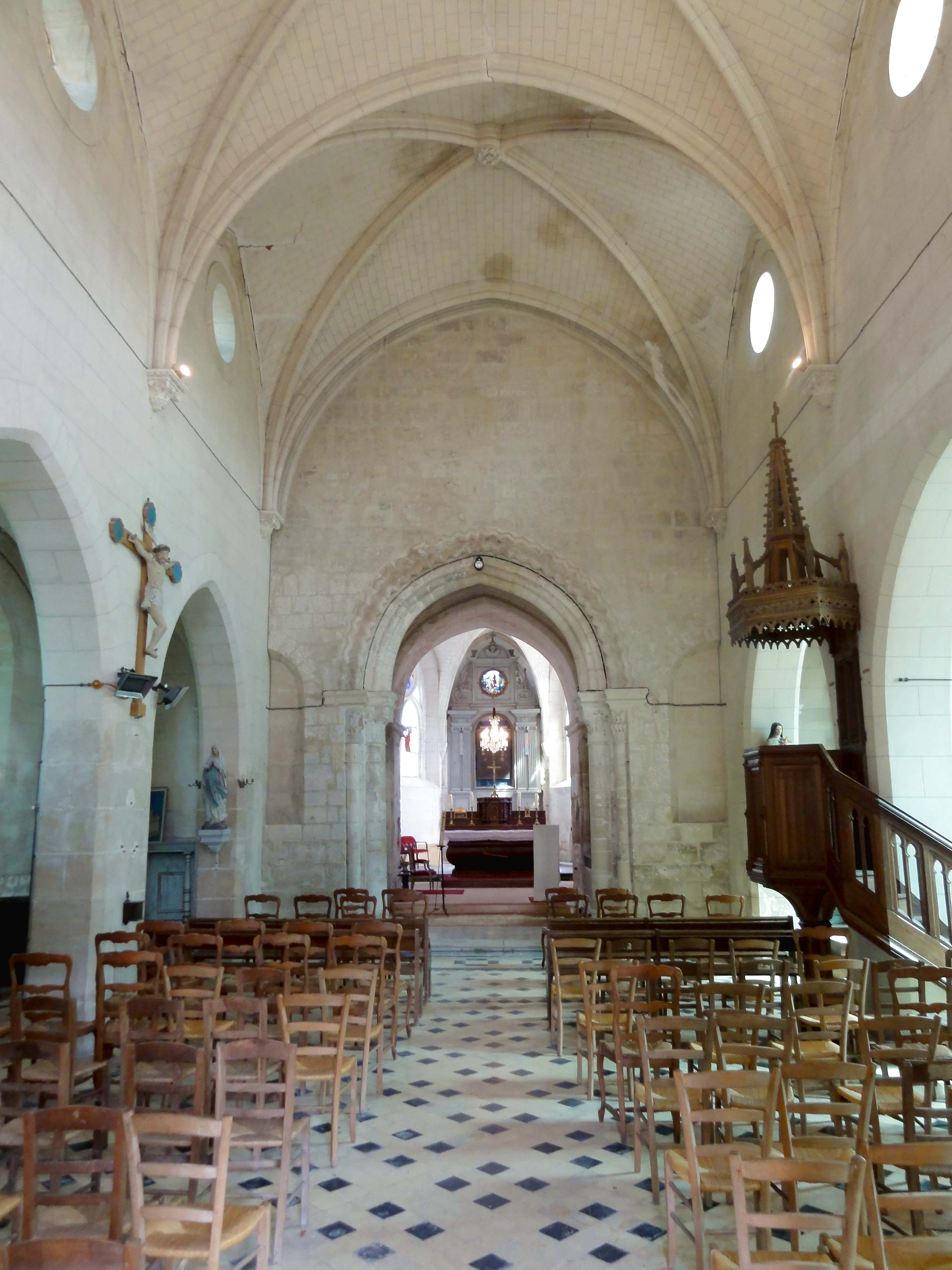 Intérieur de l'église (voir titre).